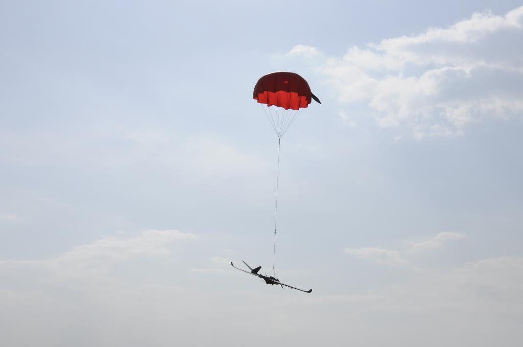 Парашут